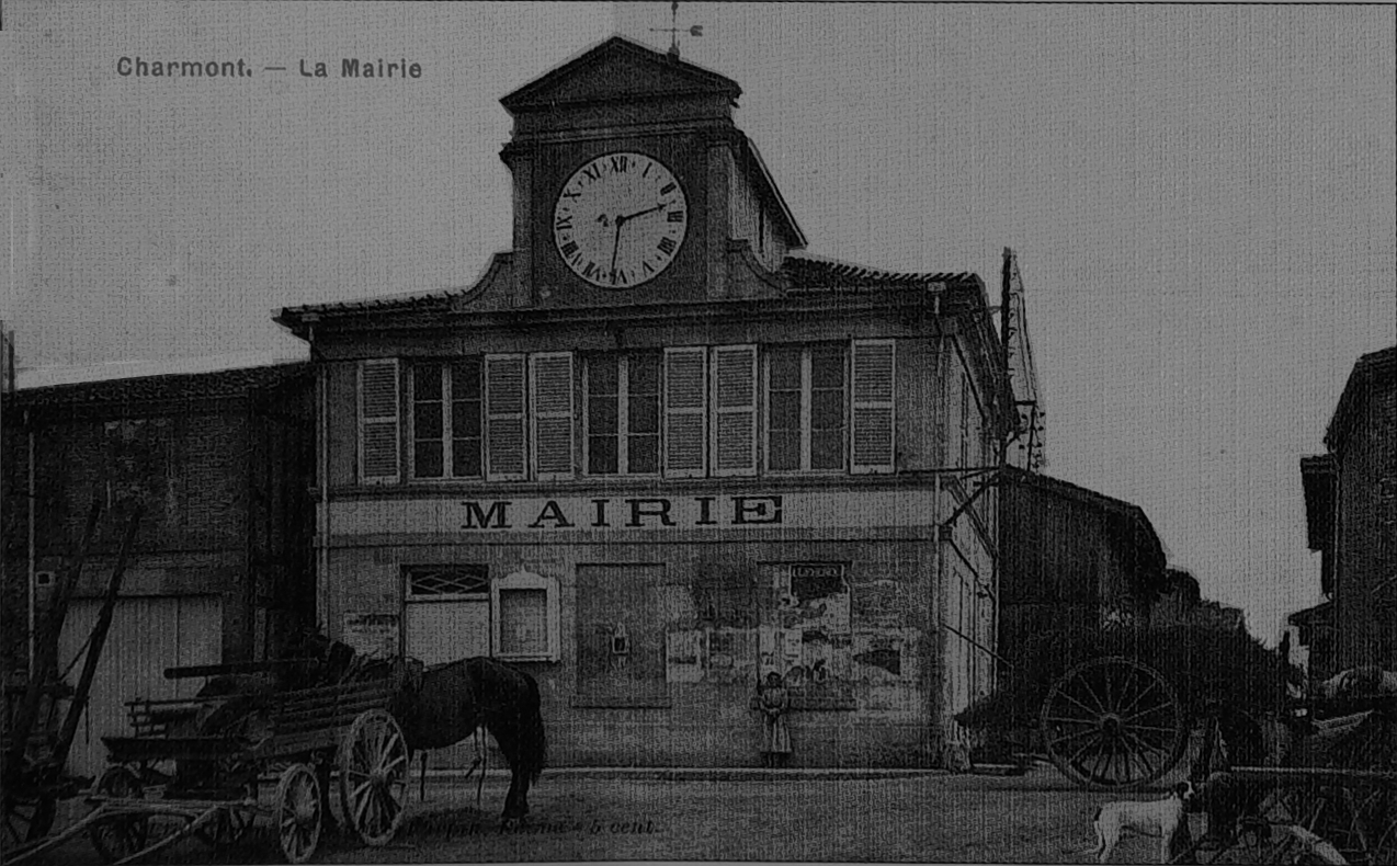 vue ancienne du village.